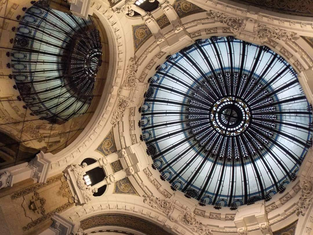 Vista de la cúpula de la Galería Güemes